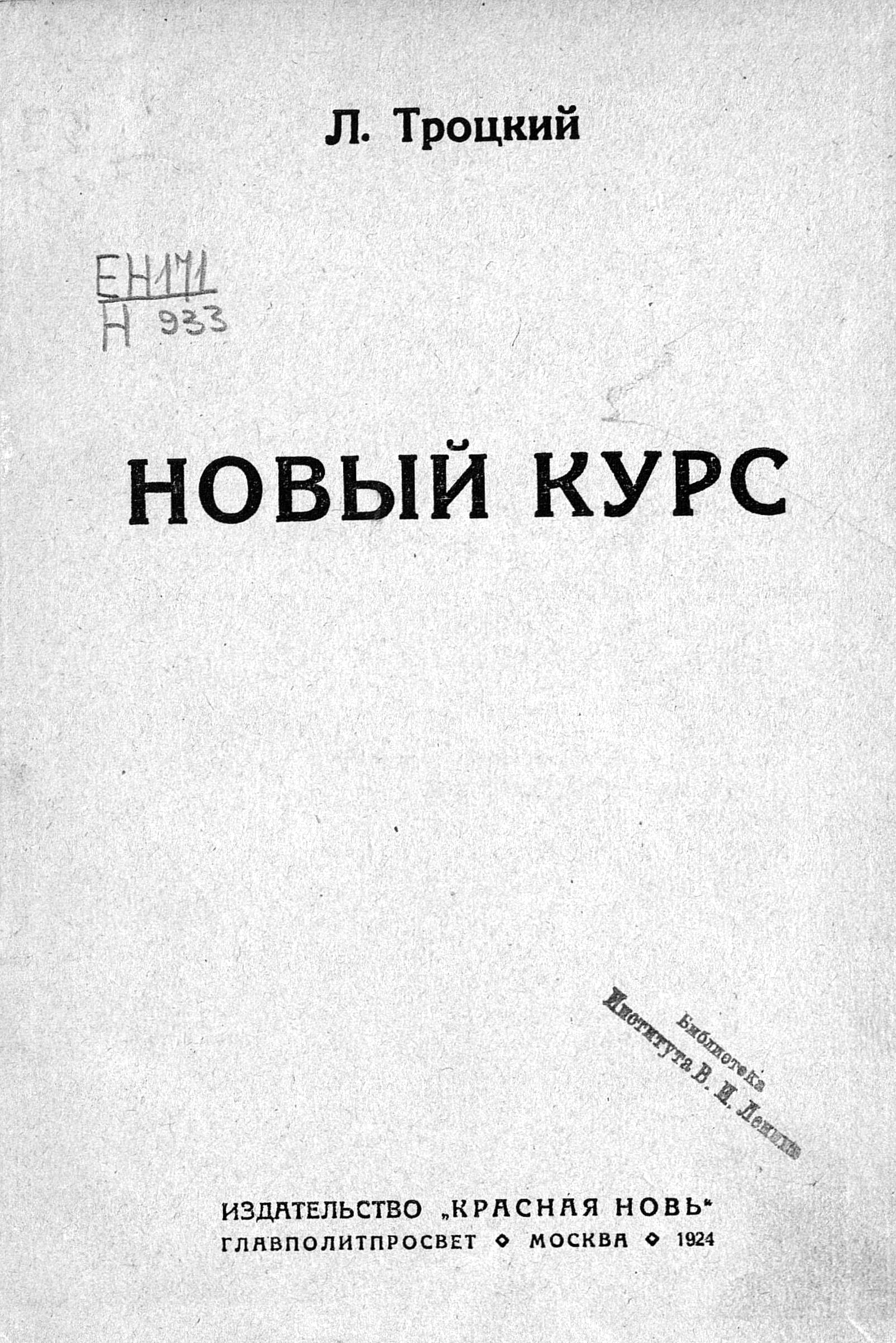 Троцкий - Новый курс (1924, обложка)